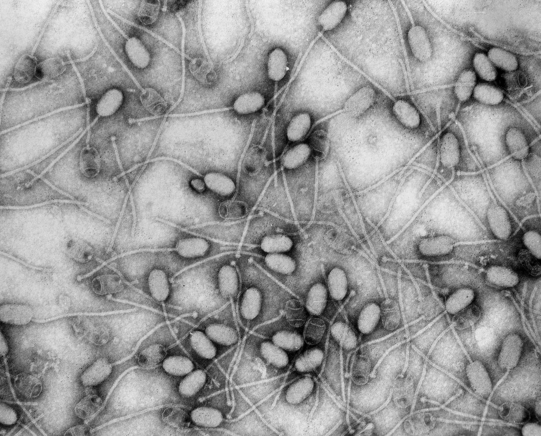 Bactériophage 3A de Staphylococcus aureus. Avec l'aimable autorisation de H.-W. Ackermann